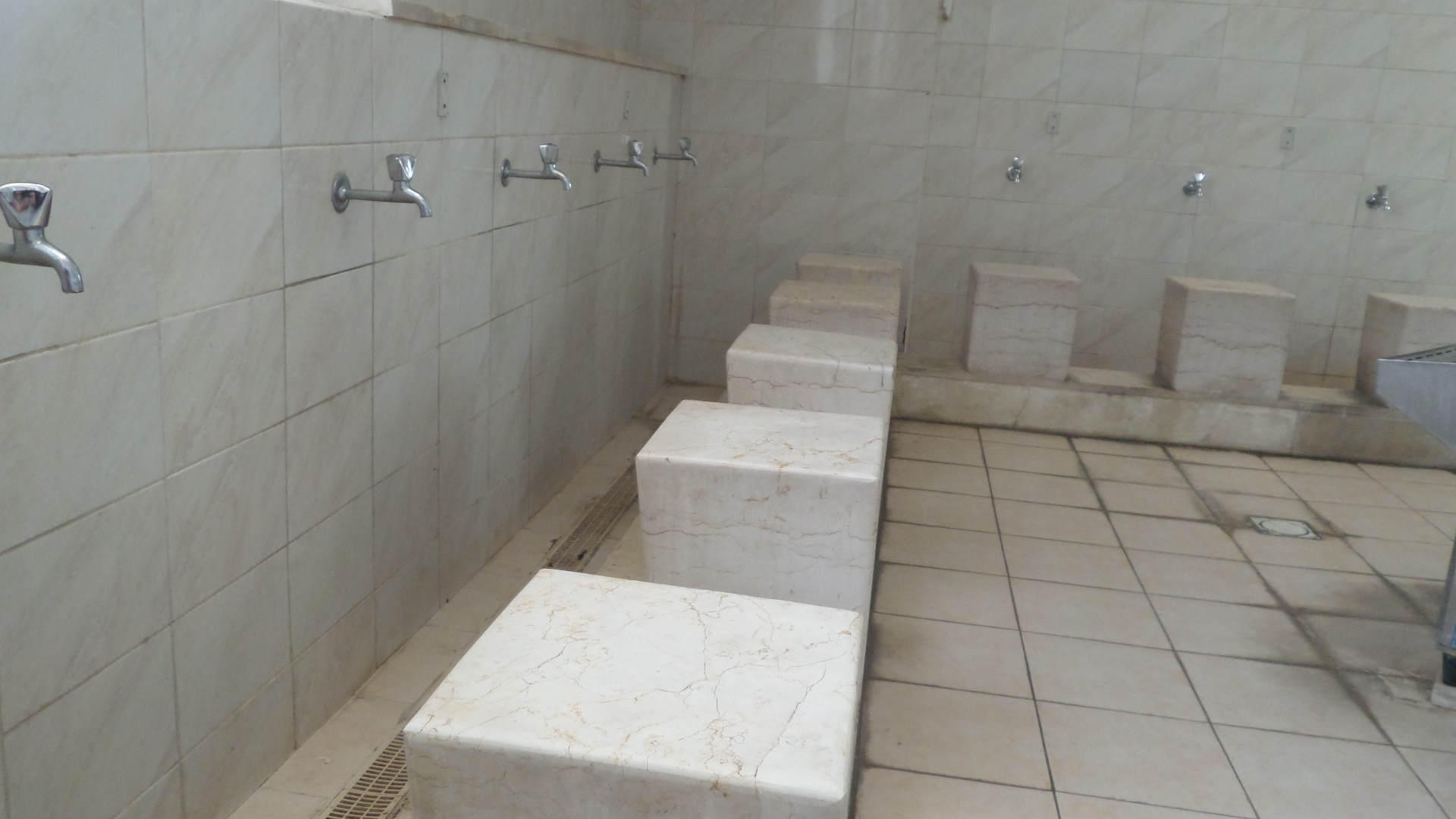 متوضأ المسجد